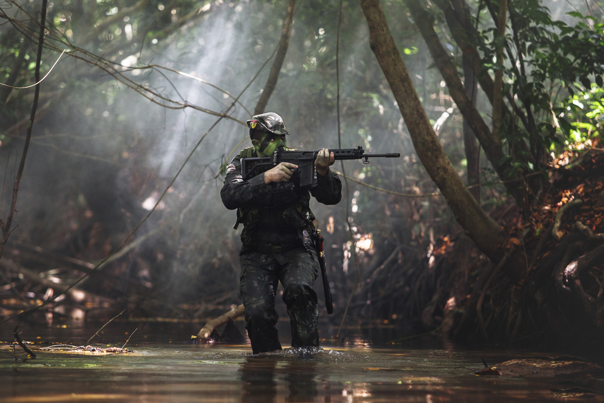 Foto: Cabo Filho/EB